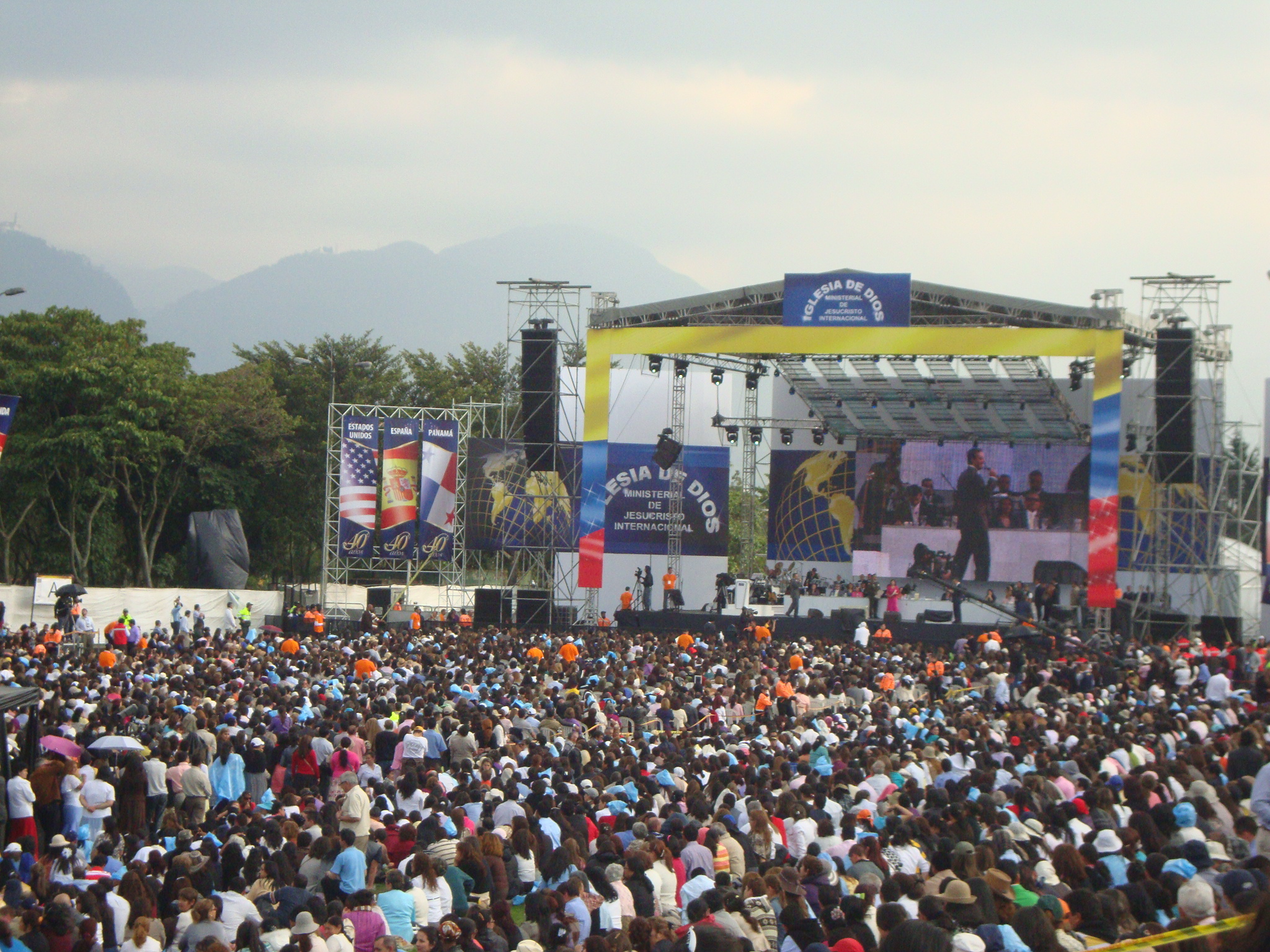 Celebración de los 40 años de la Iglesia de Dios Ministerial de Jesucristo Internacional en Bogotá